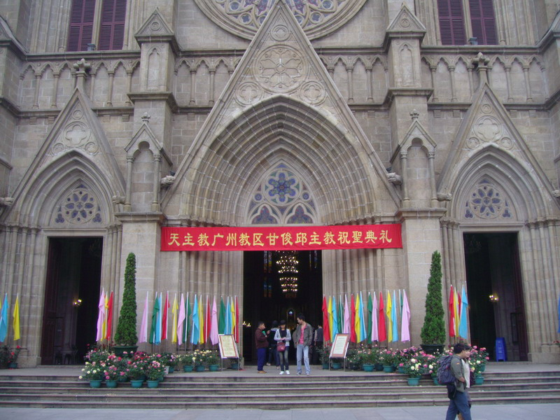 2007年天主教广州教区甘主教祝升时的场景